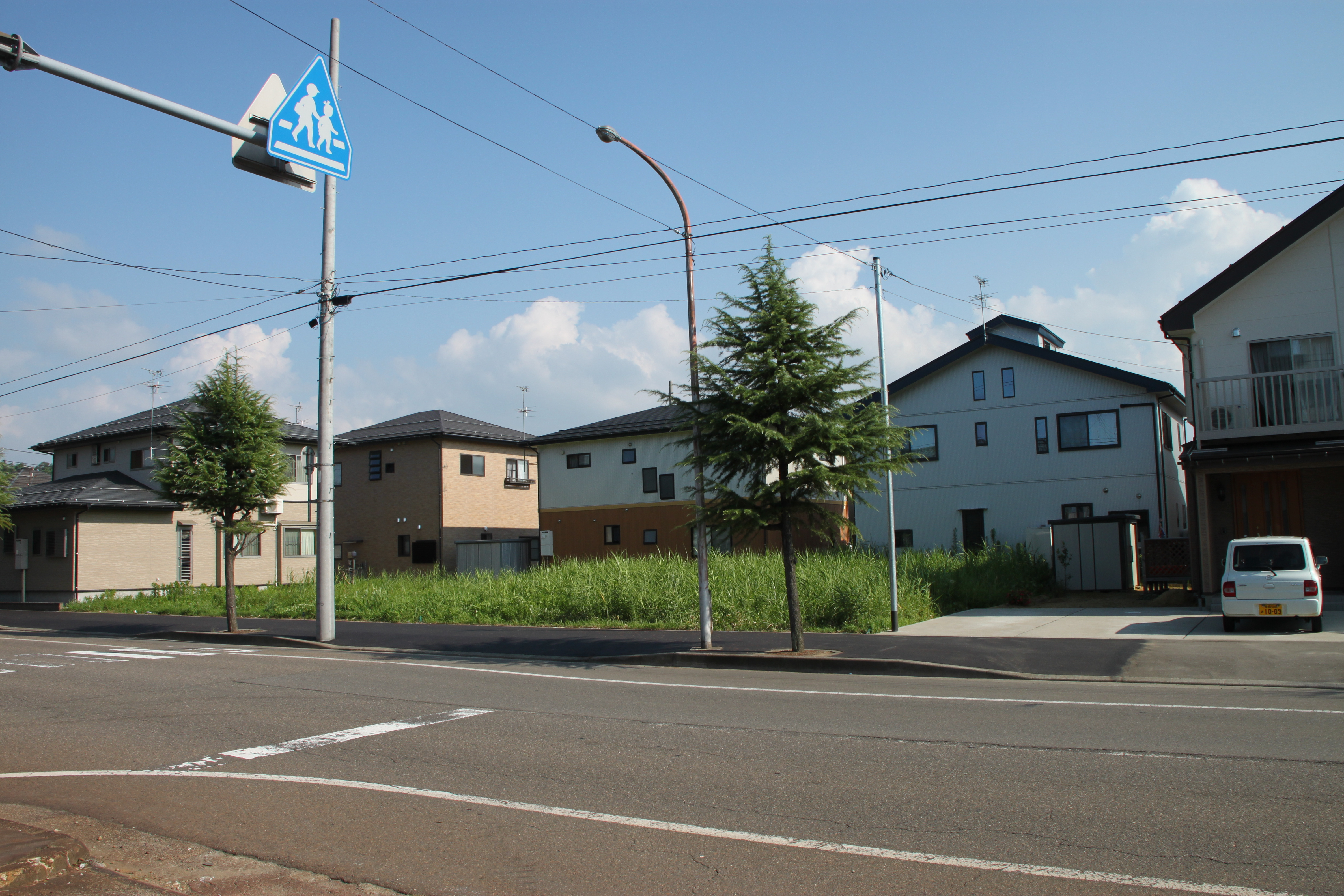 栃尾鉄道上見附駅跡。奥が長岡・栃尾方向。車のある家、およびその隣の家辺りに駅舎があった。